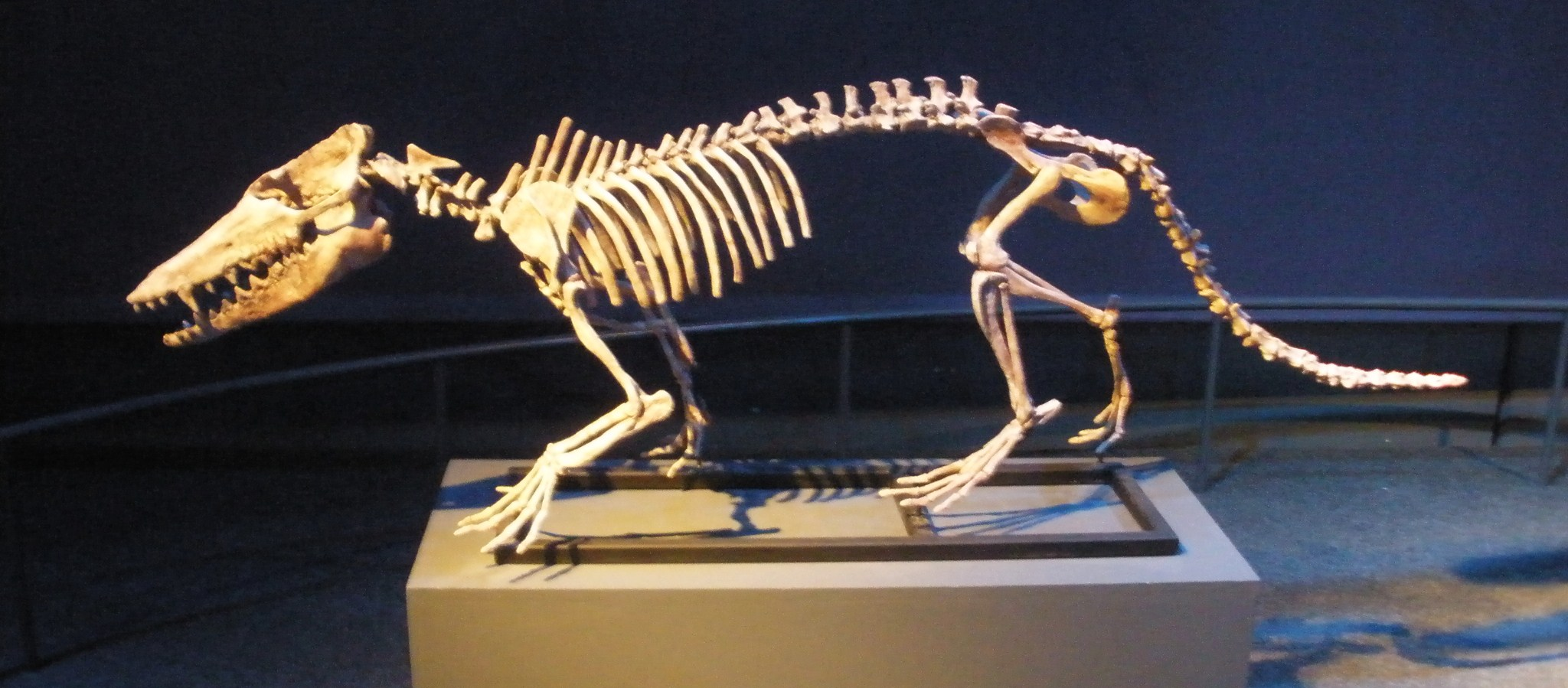 Fossil of Pakicetus, an extinct cetacean- Took the photo at Naturalis museum, Leiden